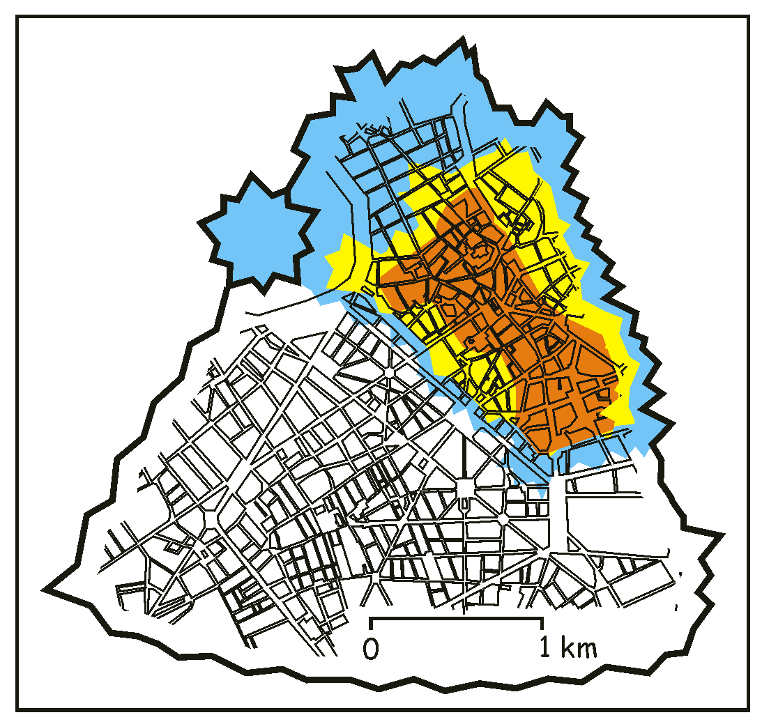 Utilisateur:Laurent Deschodt Summary position approximative de l'enceinte médiévale de Lille et de ses extensions Catégorie:Cartes et plans de Lille